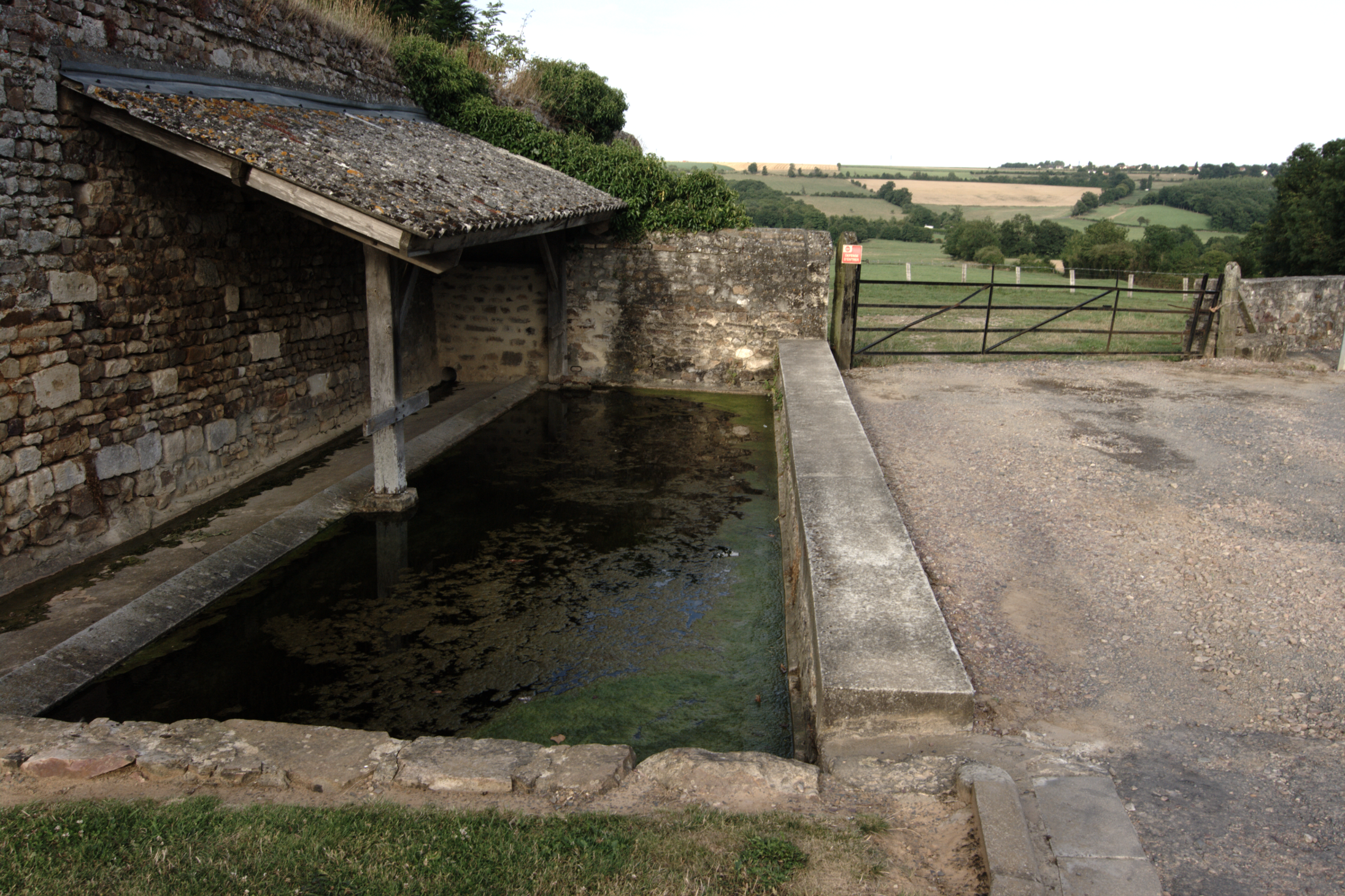 Le lavoir du Mesnil-Touffray sur la commune de Barbery, Calvados.